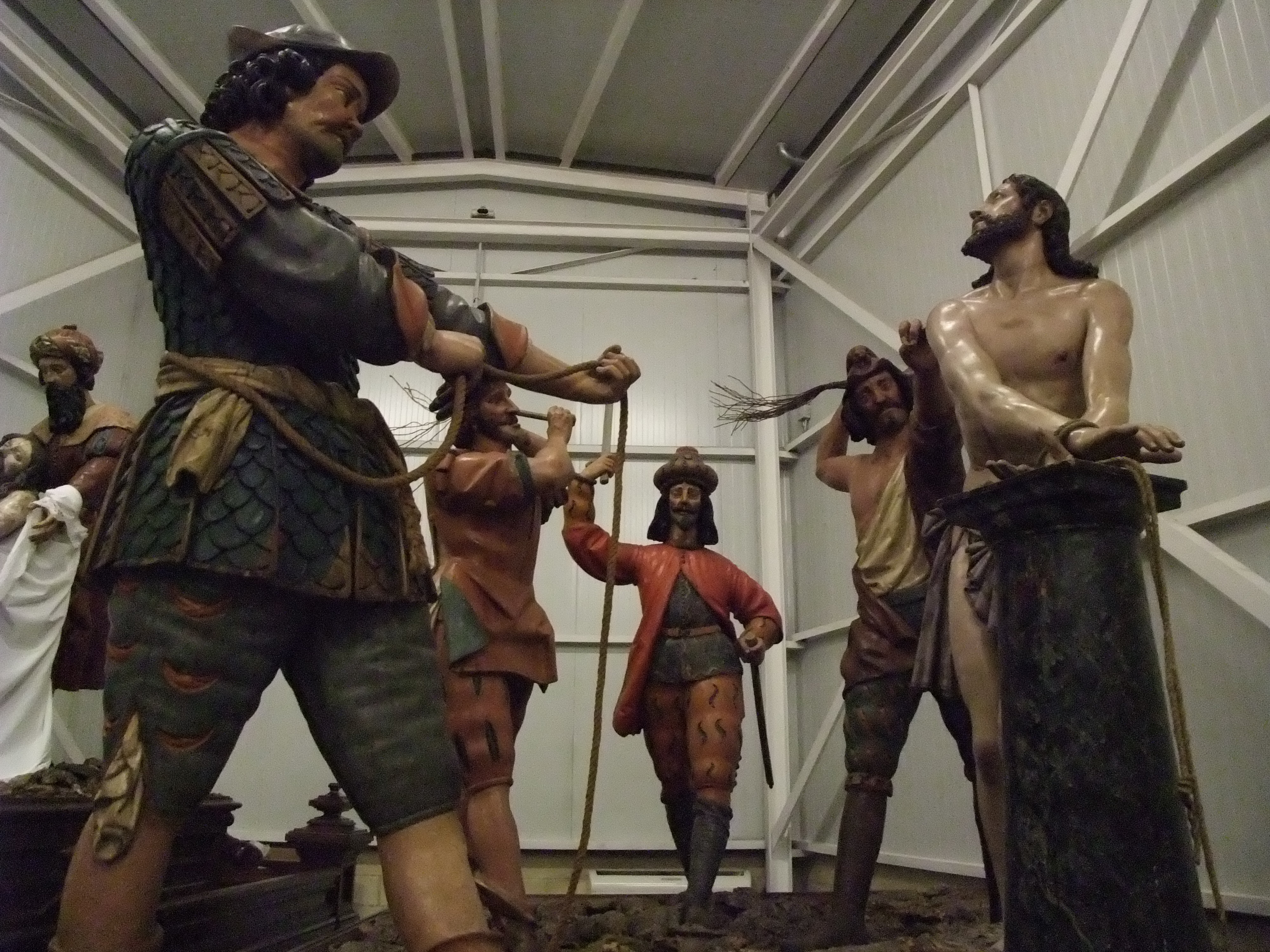 Valladolid-Exposición de pasos-1-El azotamiento de Cristo (Antonio Ribera y Francisco Díez de Tudanca)